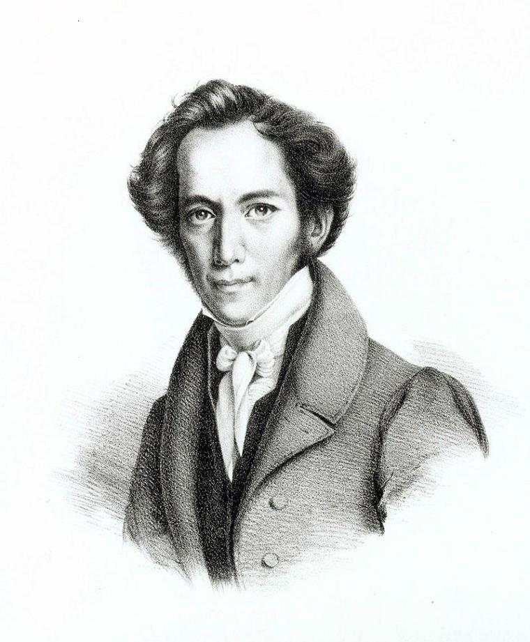 Porträt von Friedrich Schüler (* 19. August 1791 in Bergzabern; † 26. Juni 1873 in Metz)